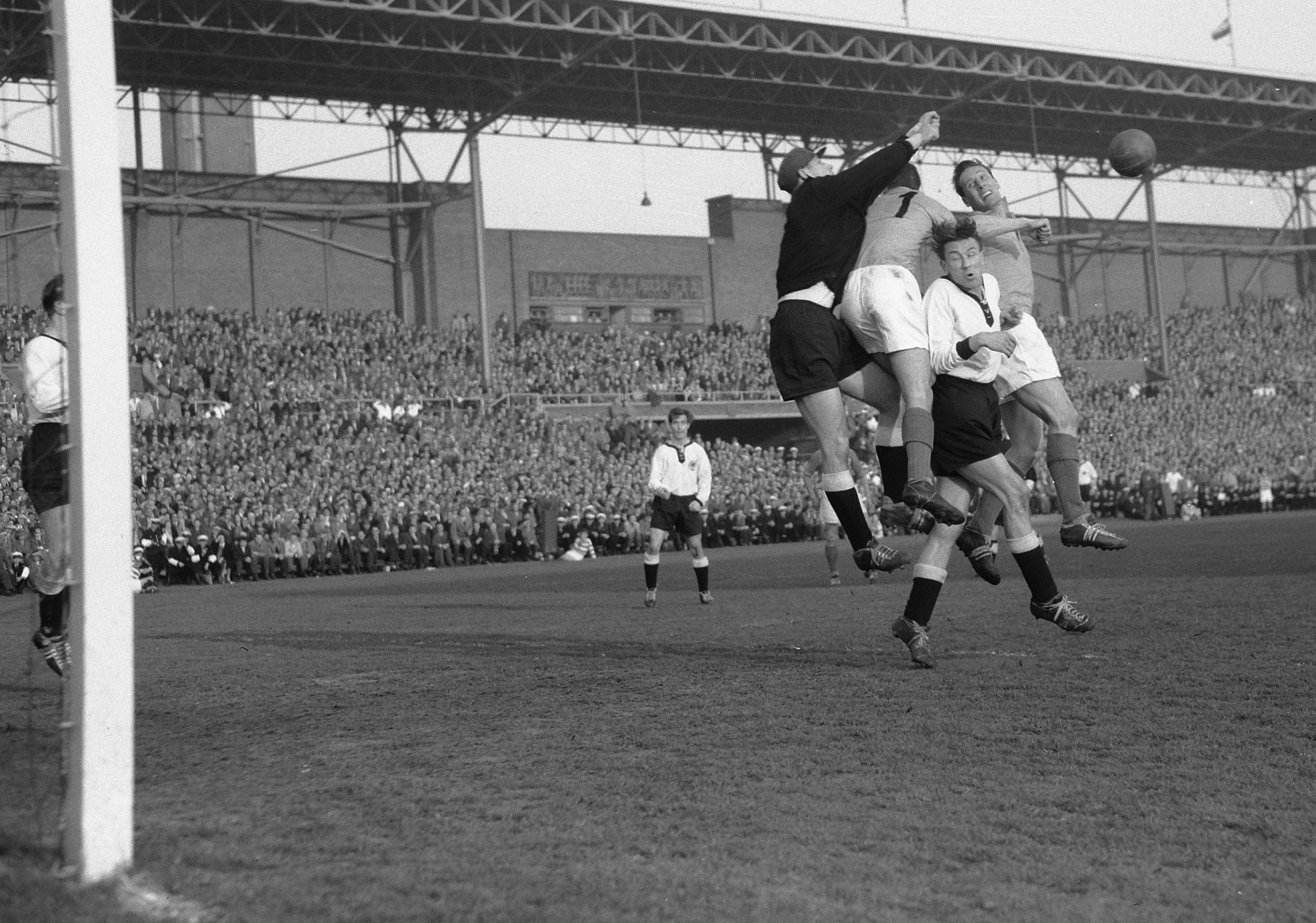 Collectie / Archief : Fotocollectie Anefo Reportage / Serie : [ onbekend ] Beschrijving : Voetbal Nederland tegen Duitsland in Olympisch Stadion Amsterdam. Duitse doelman Tilkowski, Van-der Gijp , Appel Datum : 3 april 1957 Locatie : Amsterdam, Noord-Holland Trefwoorden : doelmannen, sport, voetbal Persoonsnaam : Appel Instellingsnaam : Olympisch Stadion Fotograaf : Noske, J.D. / Anefo Auteursrechthebbende : Nationaal Archief Materiaalsoort : Negatief (zwart/wit) Nummer archiefinventaris : bekijk toegang 2.24.01.04 Bestanddeelnummer : 908-4690